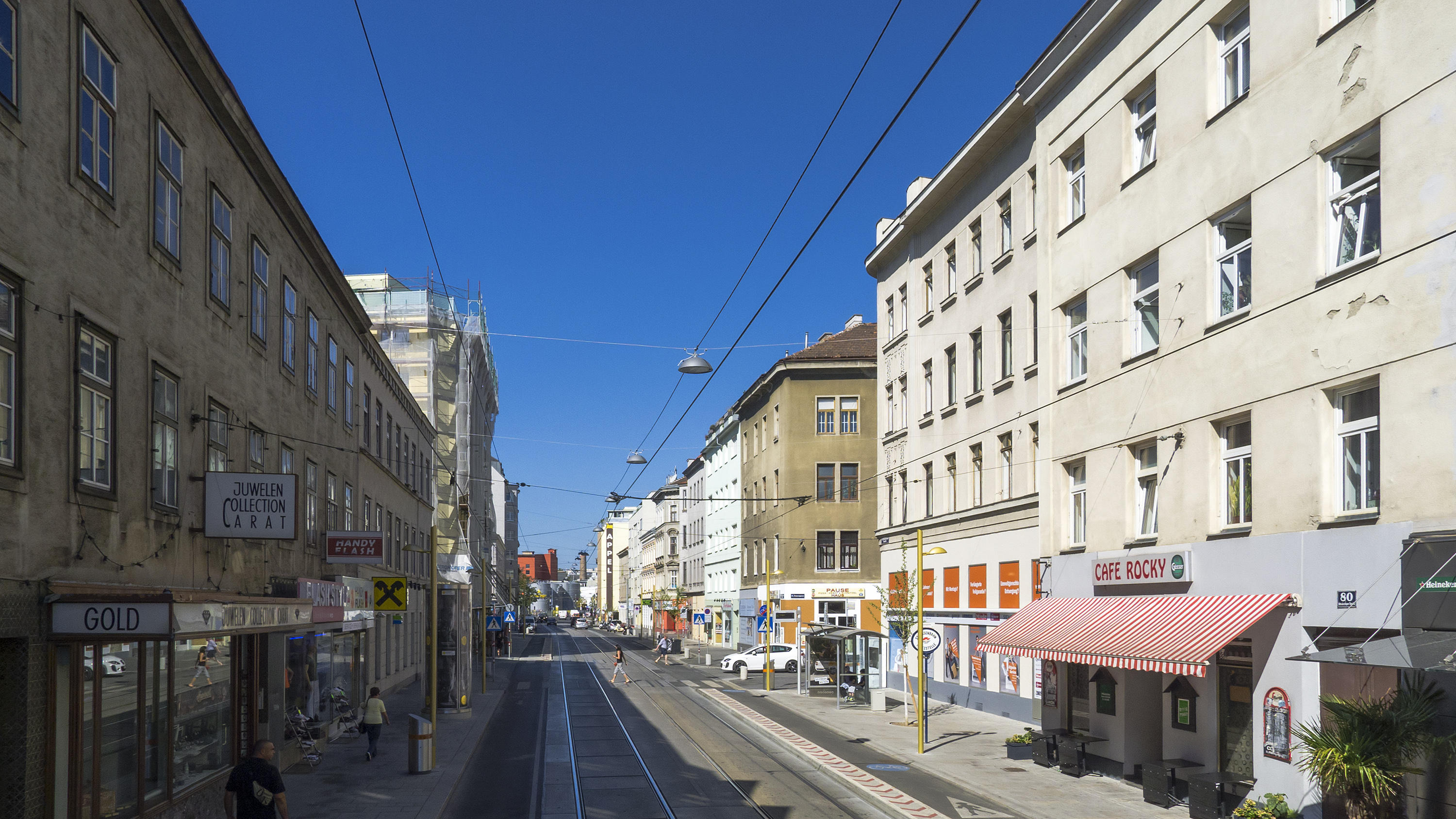 Ottakringer Straße in Wien 16 bei Nr. 65 Richtung Westen